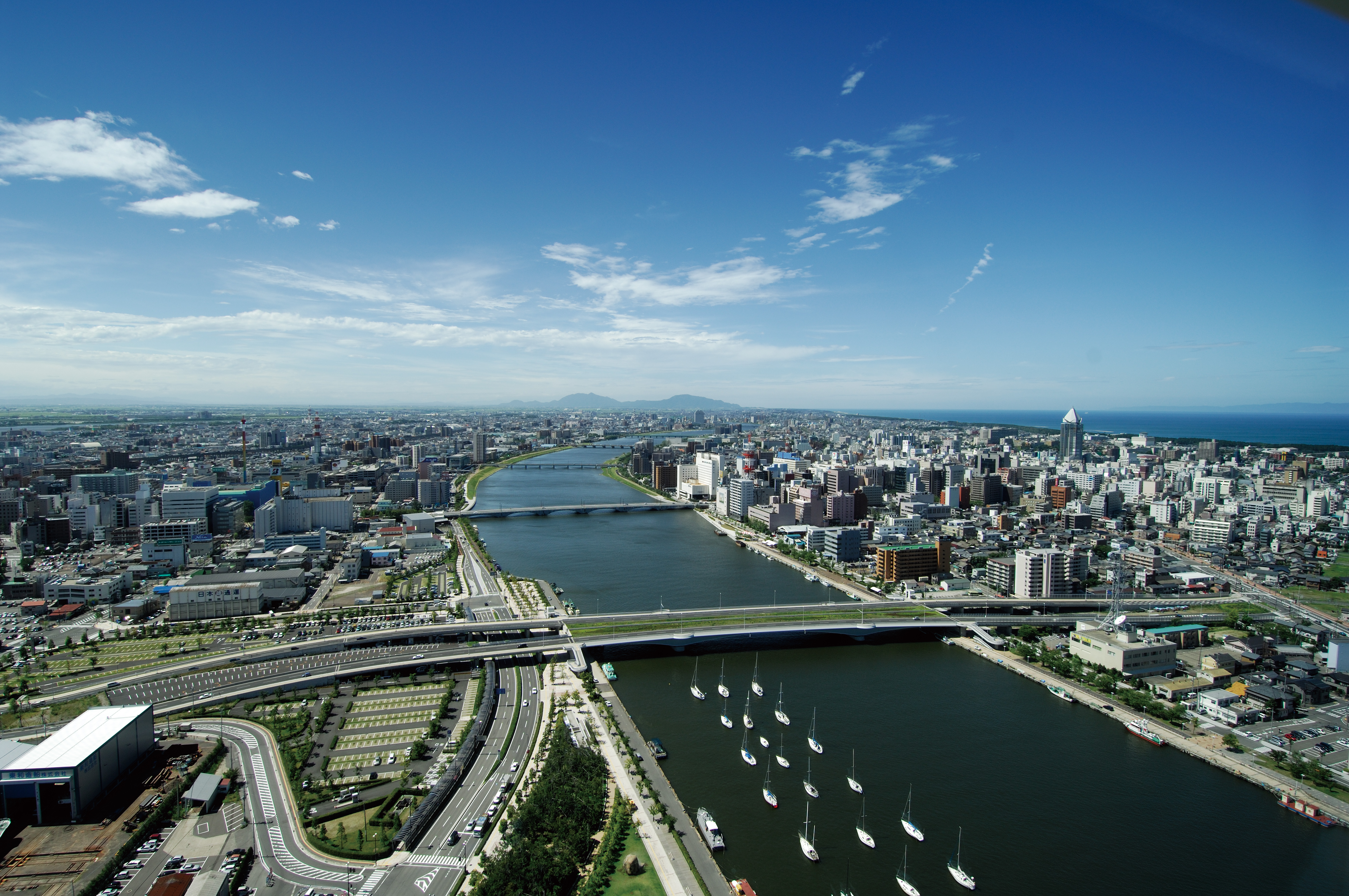 新潟市街と信濃川 新潟市中央区 2006年撮影